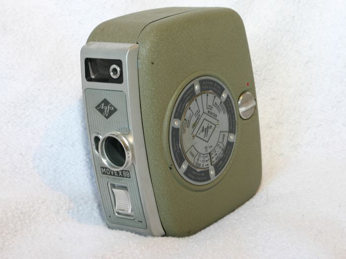 Agfa Movex 88, film-camera